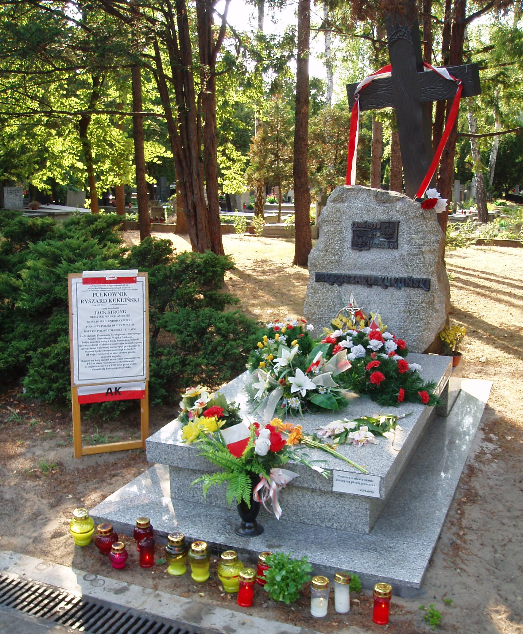 Grób pułkownika Ryszarda Kuklińskiego na warszawskim Cmentarzu Komunalnym (dawnym wojskowym) na Powązkach